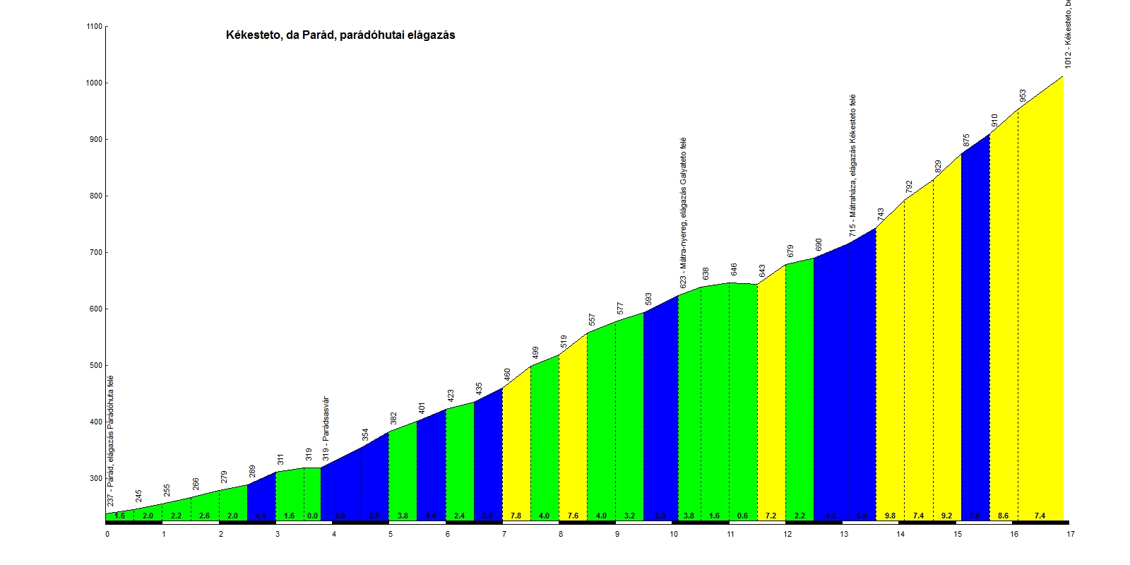 A Mátra útszelvénye Parád felől